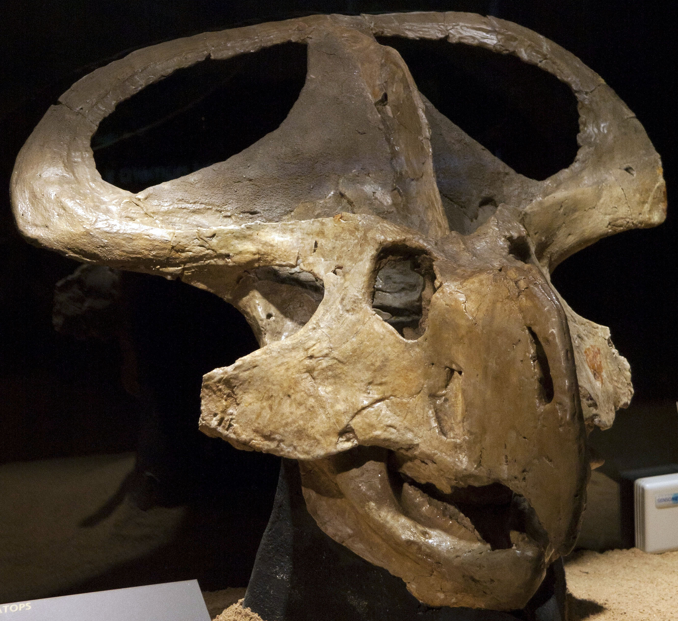 IMG_1230'